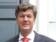 Toon Mans, burgemeester van Castricum. VVD.